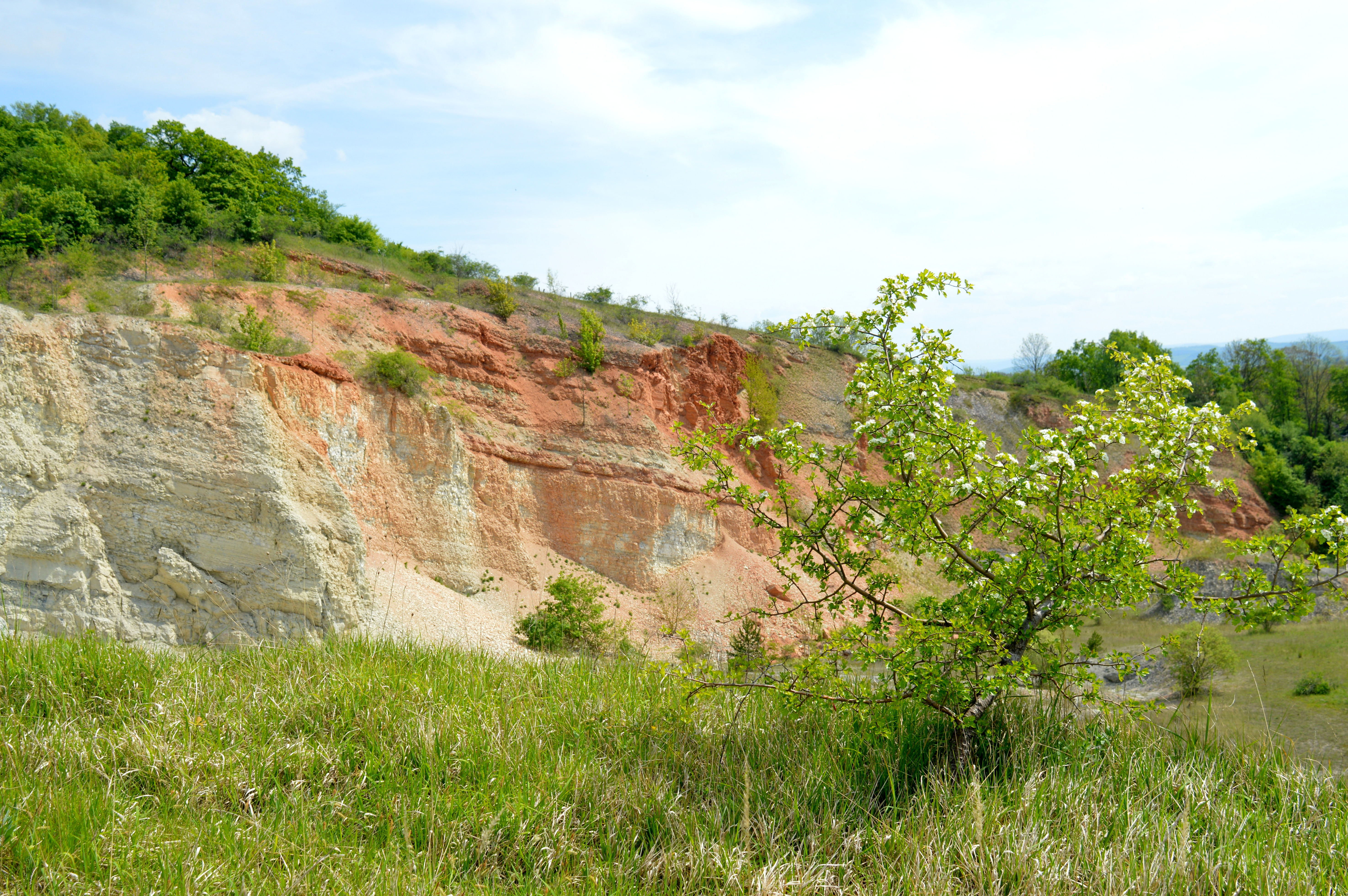 Naturschutzgebiet Steinbruch Baddeckenstedt (10)